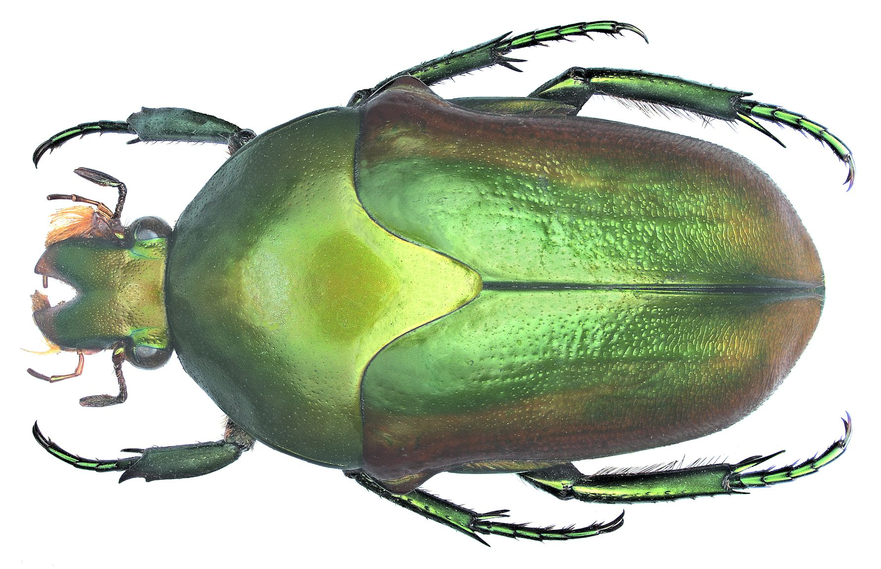 Familie: Scarabaeidae Grösse: 27 mm Verbreitung: Papua Neuguinea Fundort: Indonesien, West-Papua, Legare Mountains det. U.Schmidt Foto: U.Schmidt, 2006